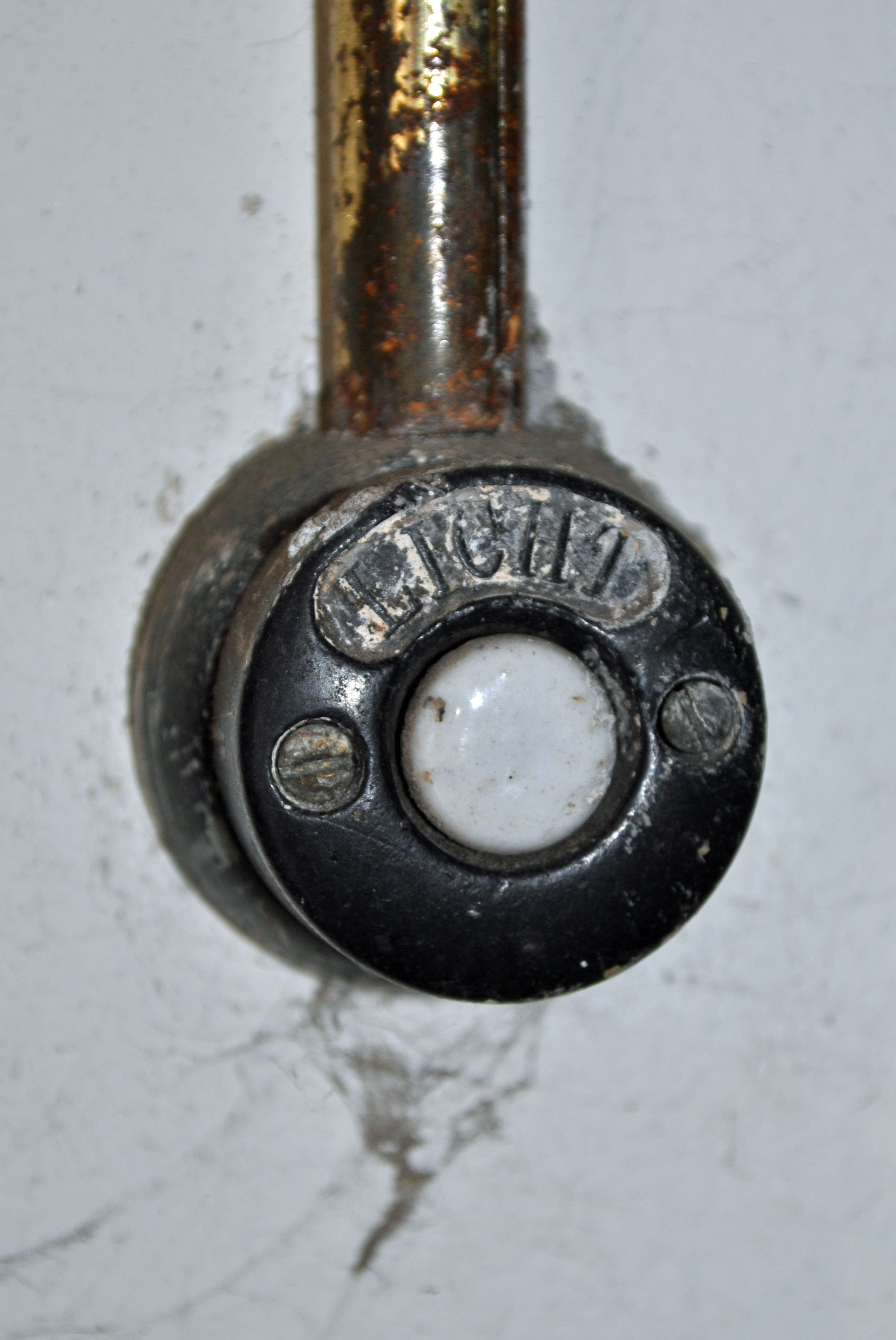 Im Tierpark Stralsund (see Tierpark Stralsund.